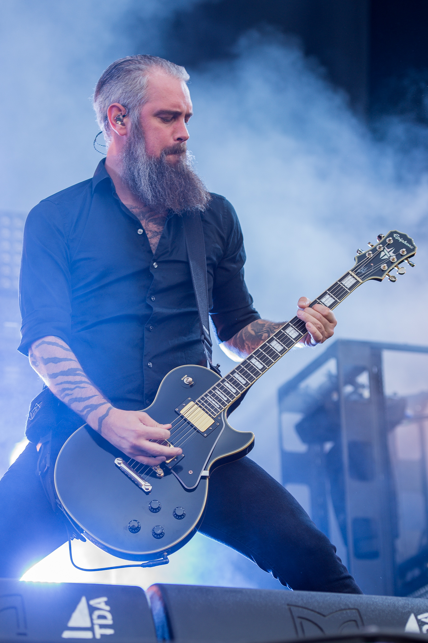 ARGO-Konzerte,Beck's Park Stage,Björn Gelotte,Festival,In Flames,Konzert,Livekonzert,Livemusik,Musik,RiP,Rock im Park 2015